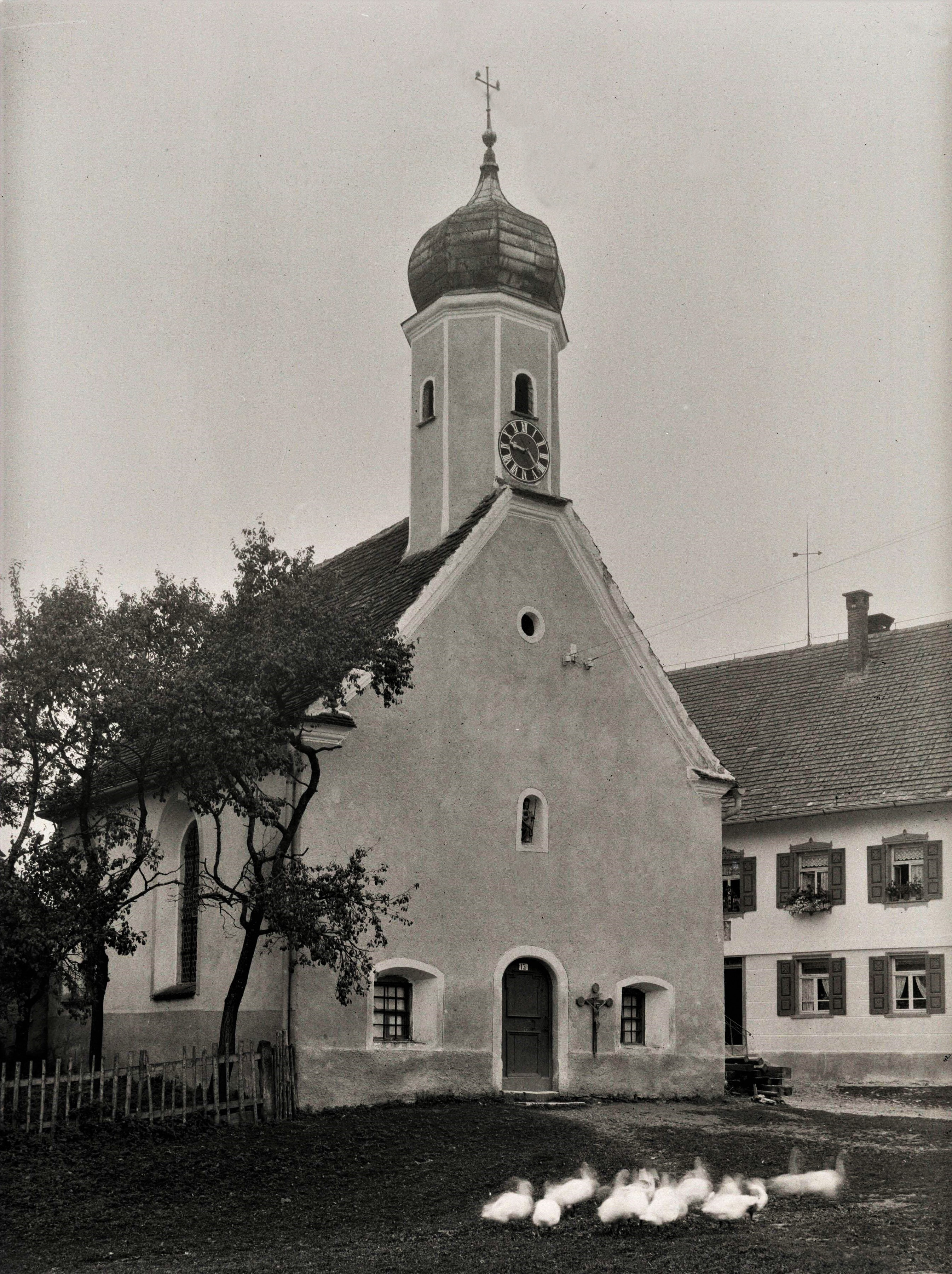 Kapelle St. Jakobus nach Südwesten, aufgenommen etwa 1925.